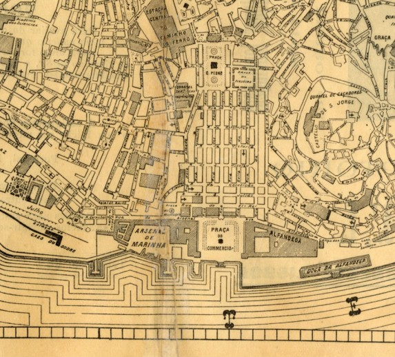 «Planta de Lisboa: seu porto, novas avenidas, etc. Pormenor. Delineada por Caldeira Pires; grav. P. Marinho. - Lisboa : Typ. do Annuario Commercial, 1905»